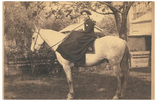 Old Whitey, horse of US president Rutherford B. Hayes